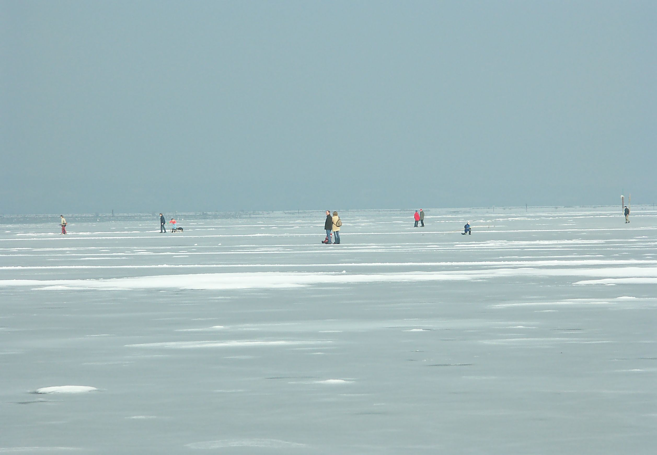 Zugefrorenes Bodenseeufer in Fußach mit Spaziergängern und Eisläufern.